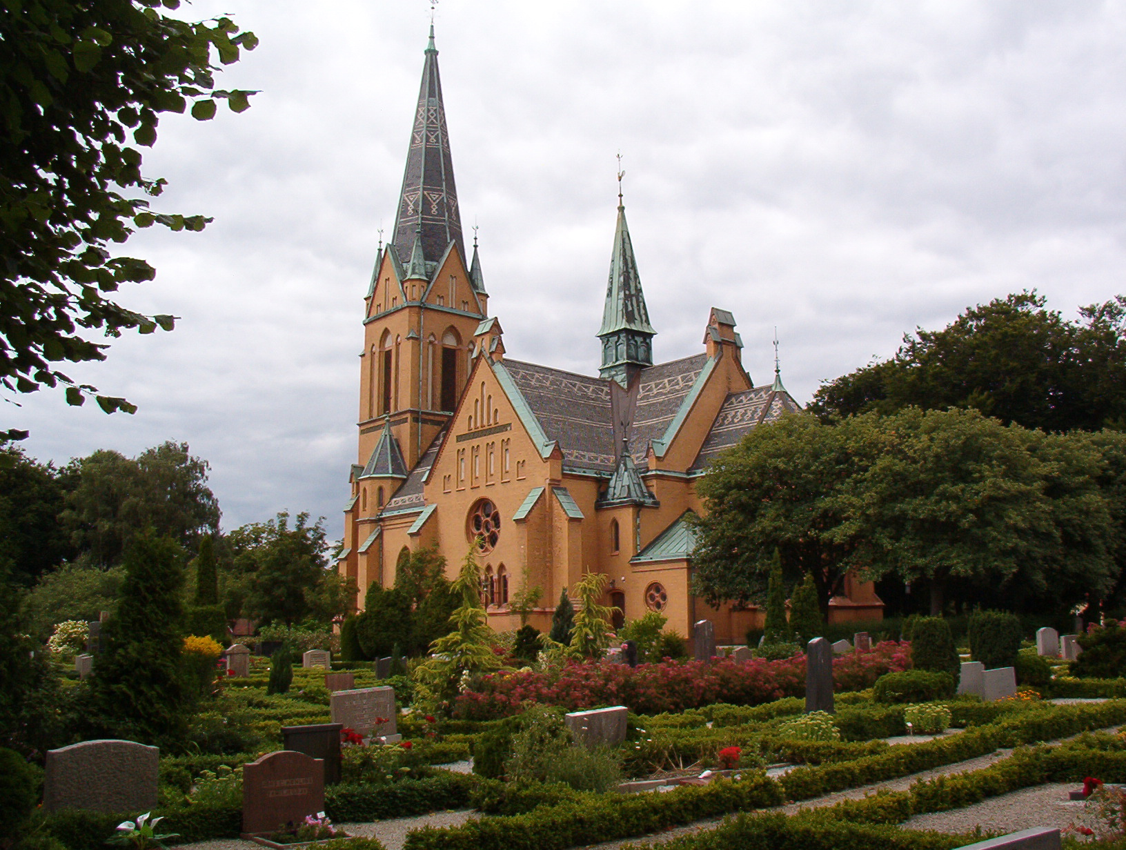 date july 2005